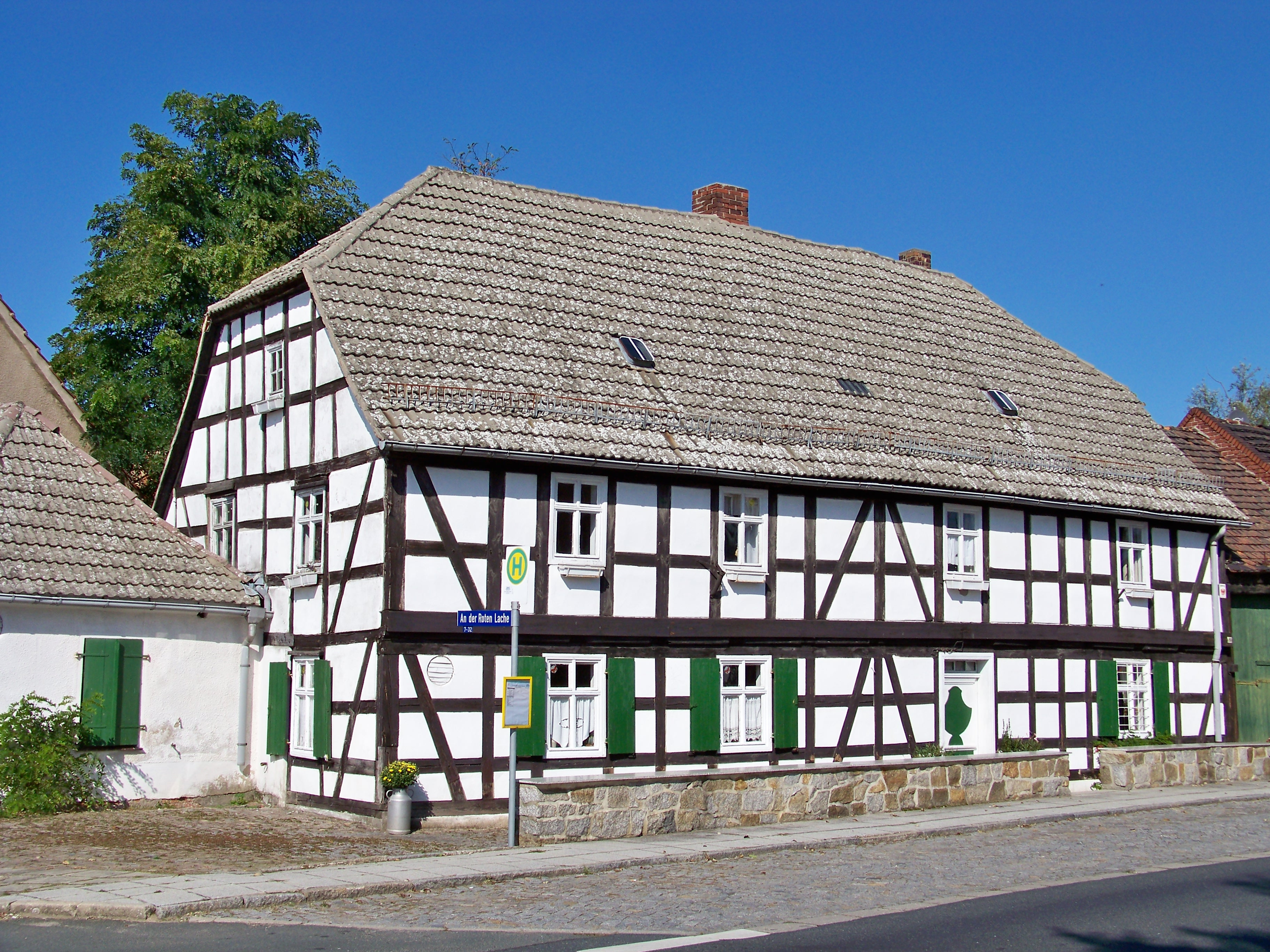 Feuersozietät in Löhsten (Herzberg/Elster)